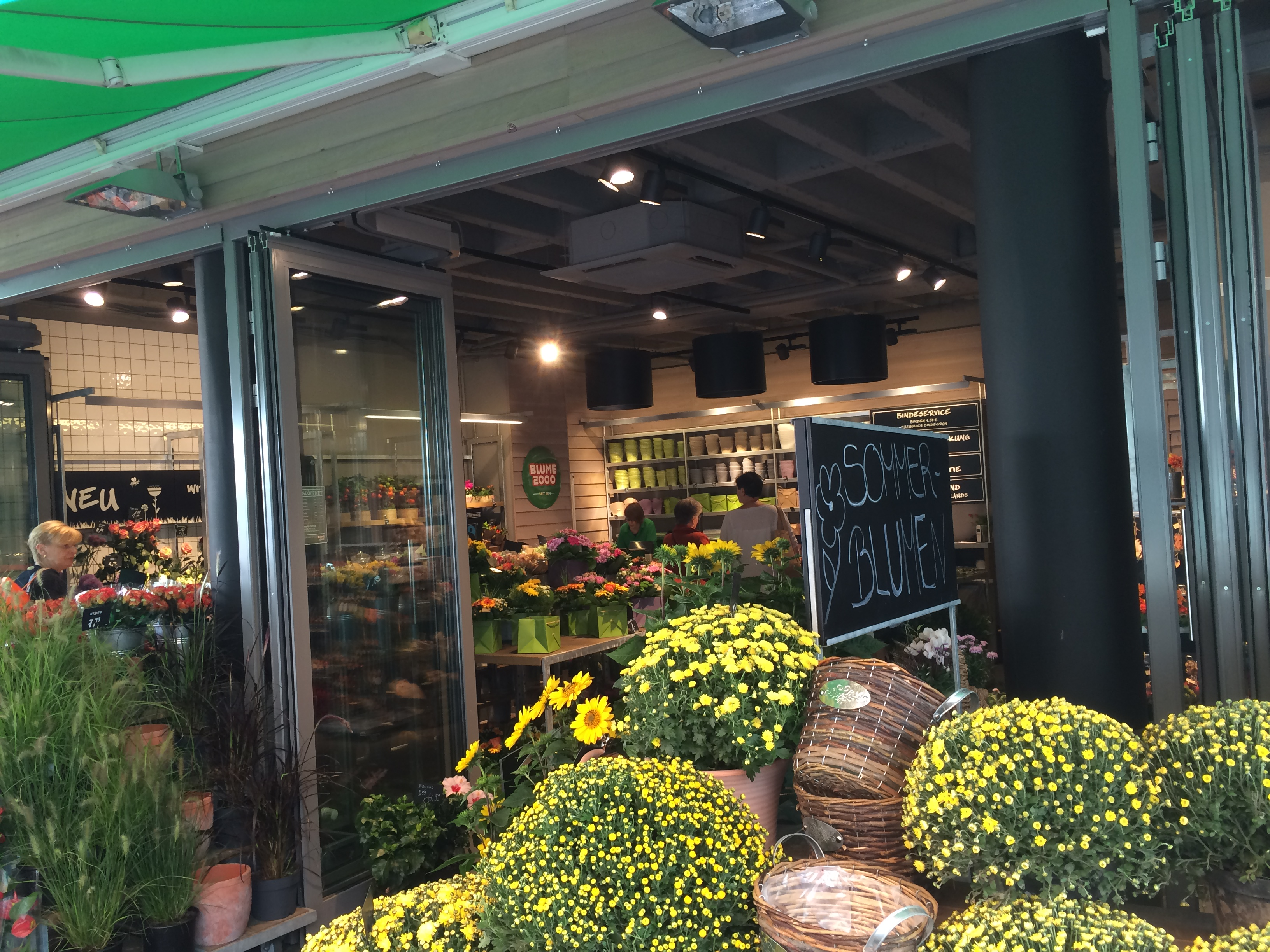 Blume 2000 inside